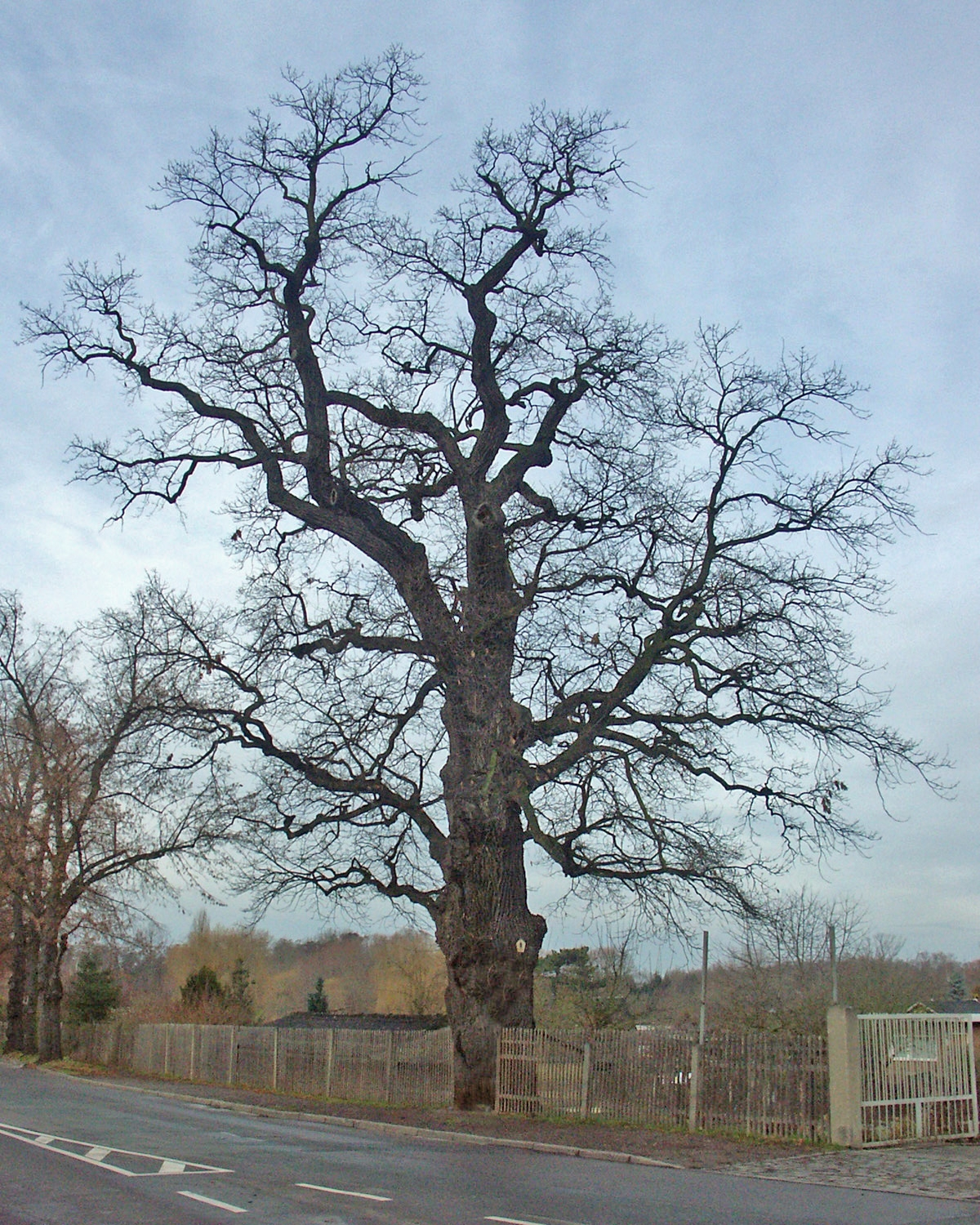 Die über 300 Jahre alte Eiche an der Leinestraße in Leipzig-Dösen